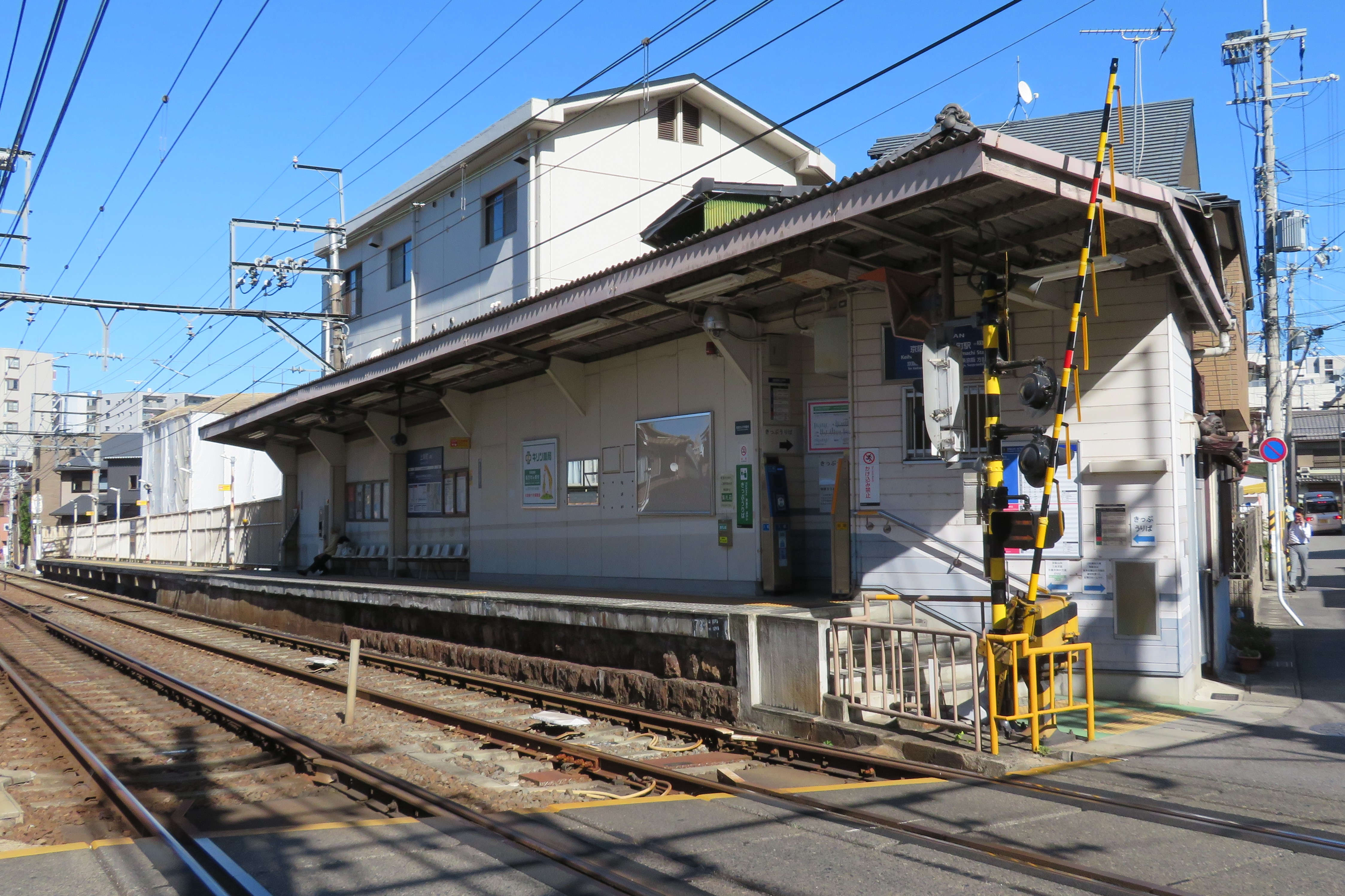 京阪電鉄上栄町駅